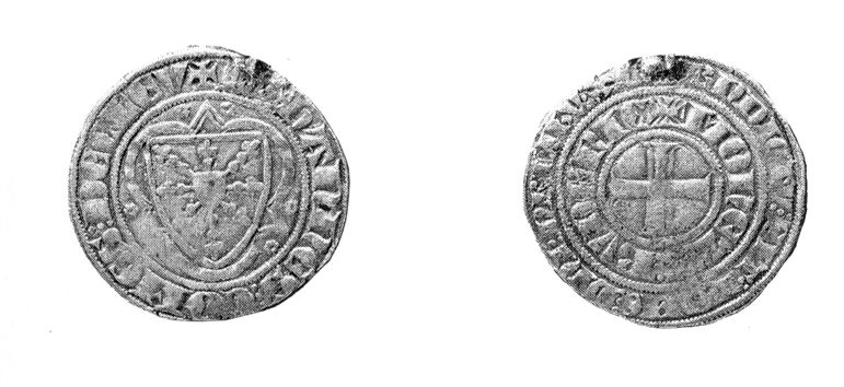 Büdericher Groschen von ca. 1350-1370